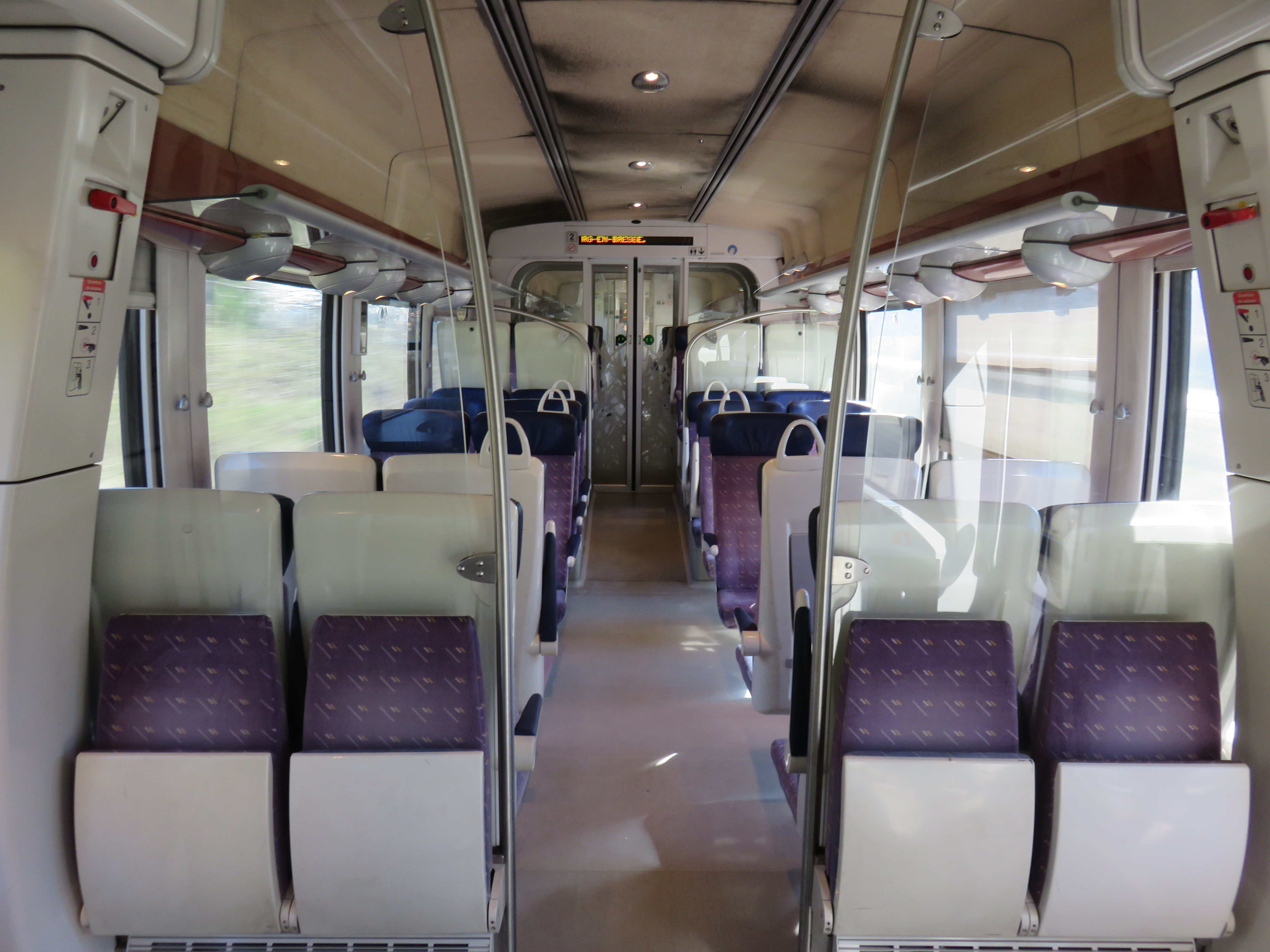 Intérieur d'un TER X 76500 de la SNCF (sur la ligne Roanne-Bourg-en-Bresse).